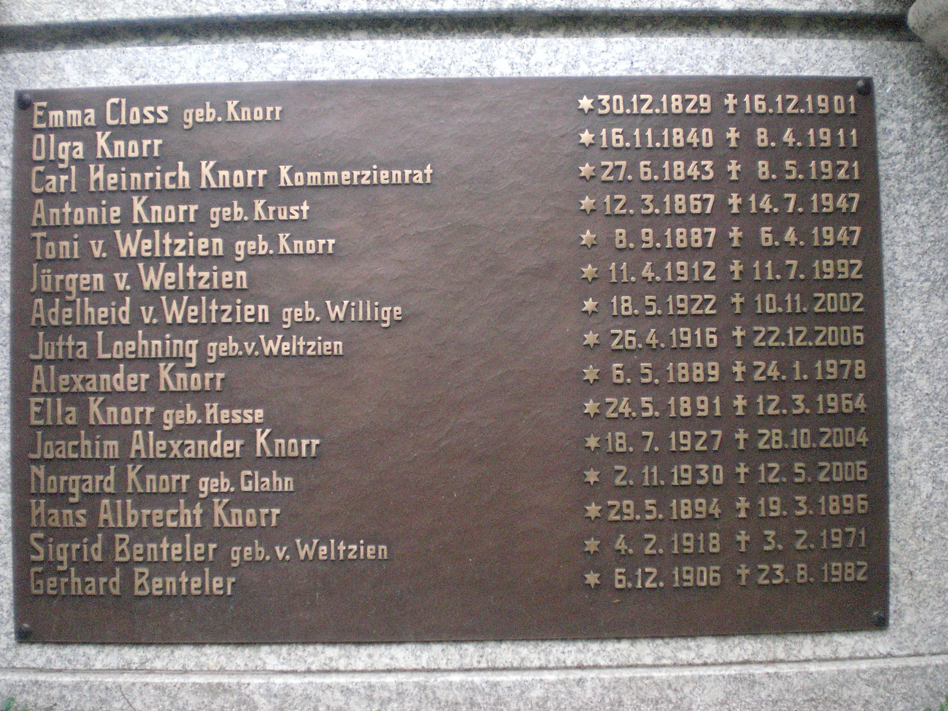 Das Bild zeigt die Tafel, die auf dem Grab der Familie Knorr links angebracht ist. Das Grab befindet sich auf dem Hauptfriedhof in Heilbronn.